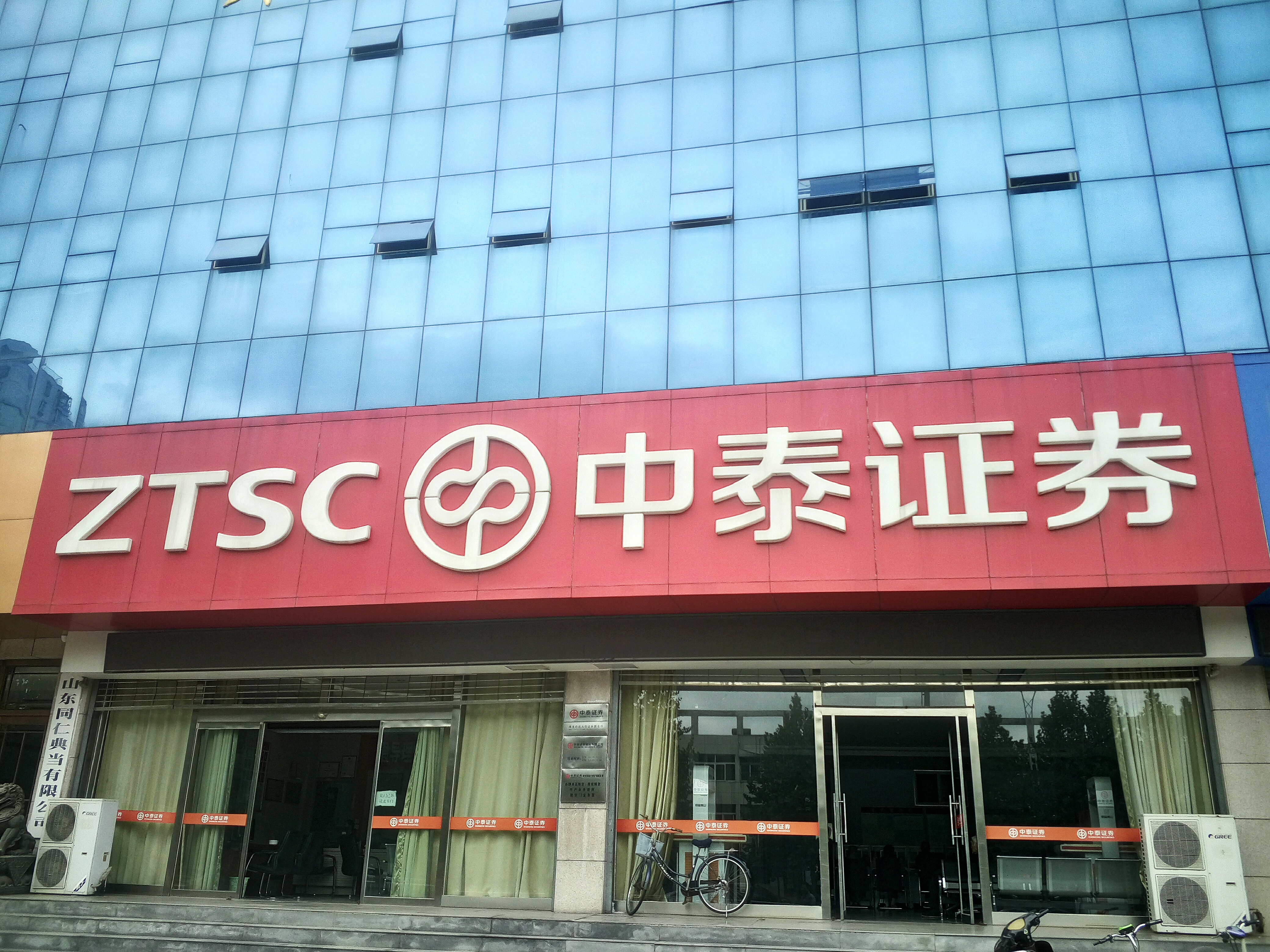 中泰证券在钢城